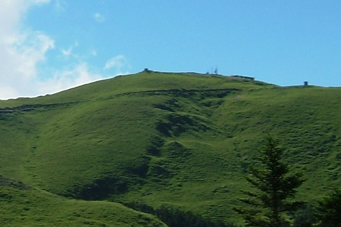 合歡主峰，山頂隱約可見無線發射站